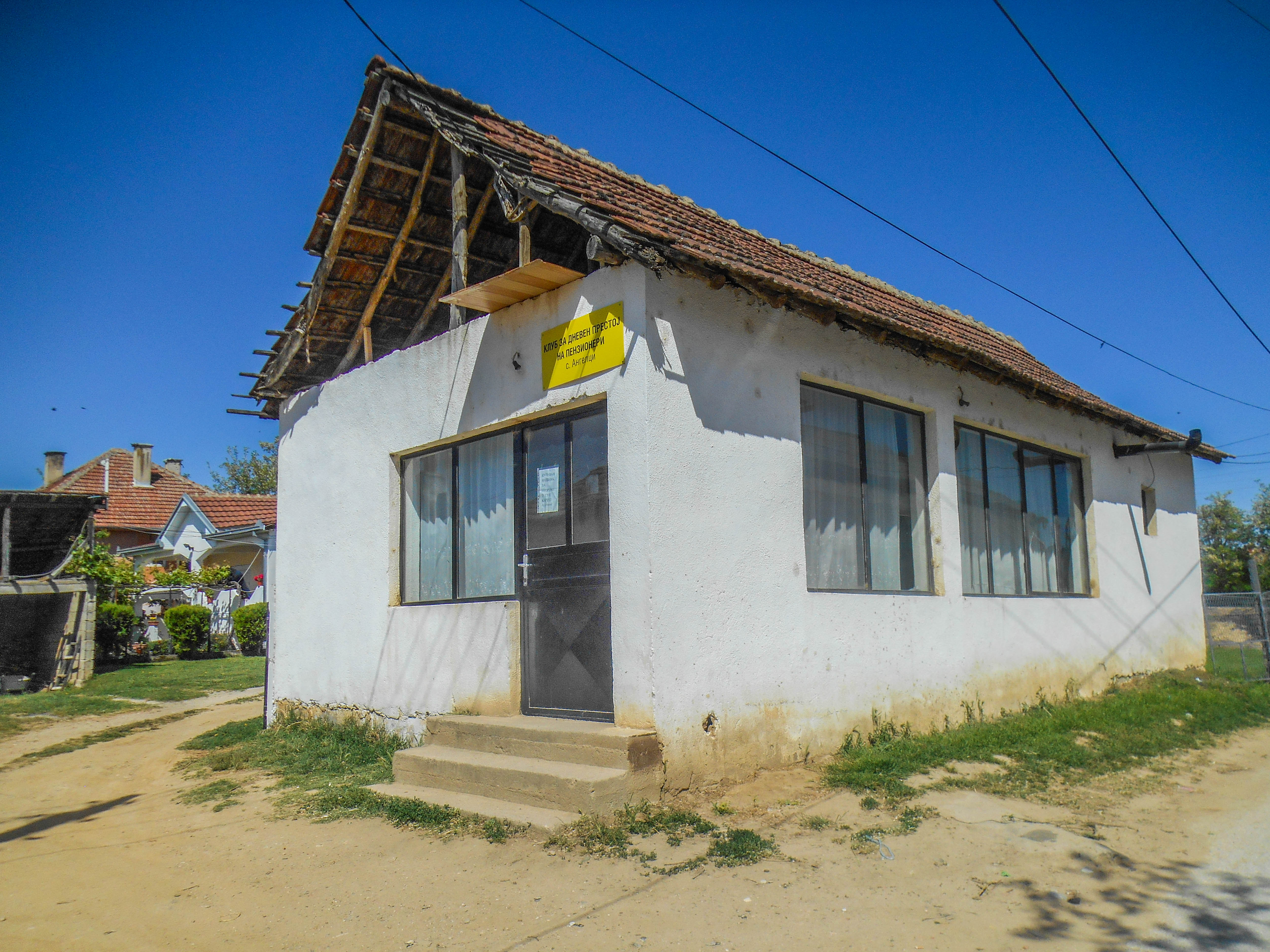 Клуб на пензионери - Ангелци